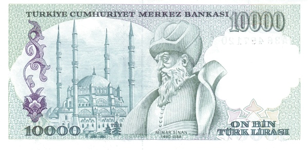 E7 serisi 10.000 TL'nin arka yüzü